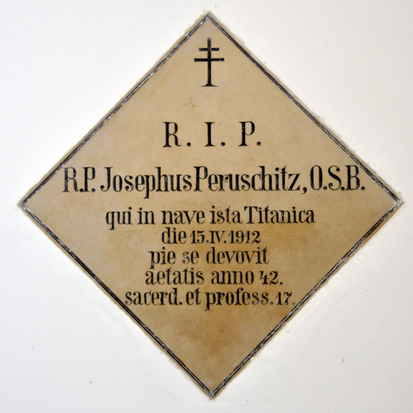 Pater Joseph Peruschitz 1. Mit freundlicher Erlaubnis des Klosters Scheyern, ©fm